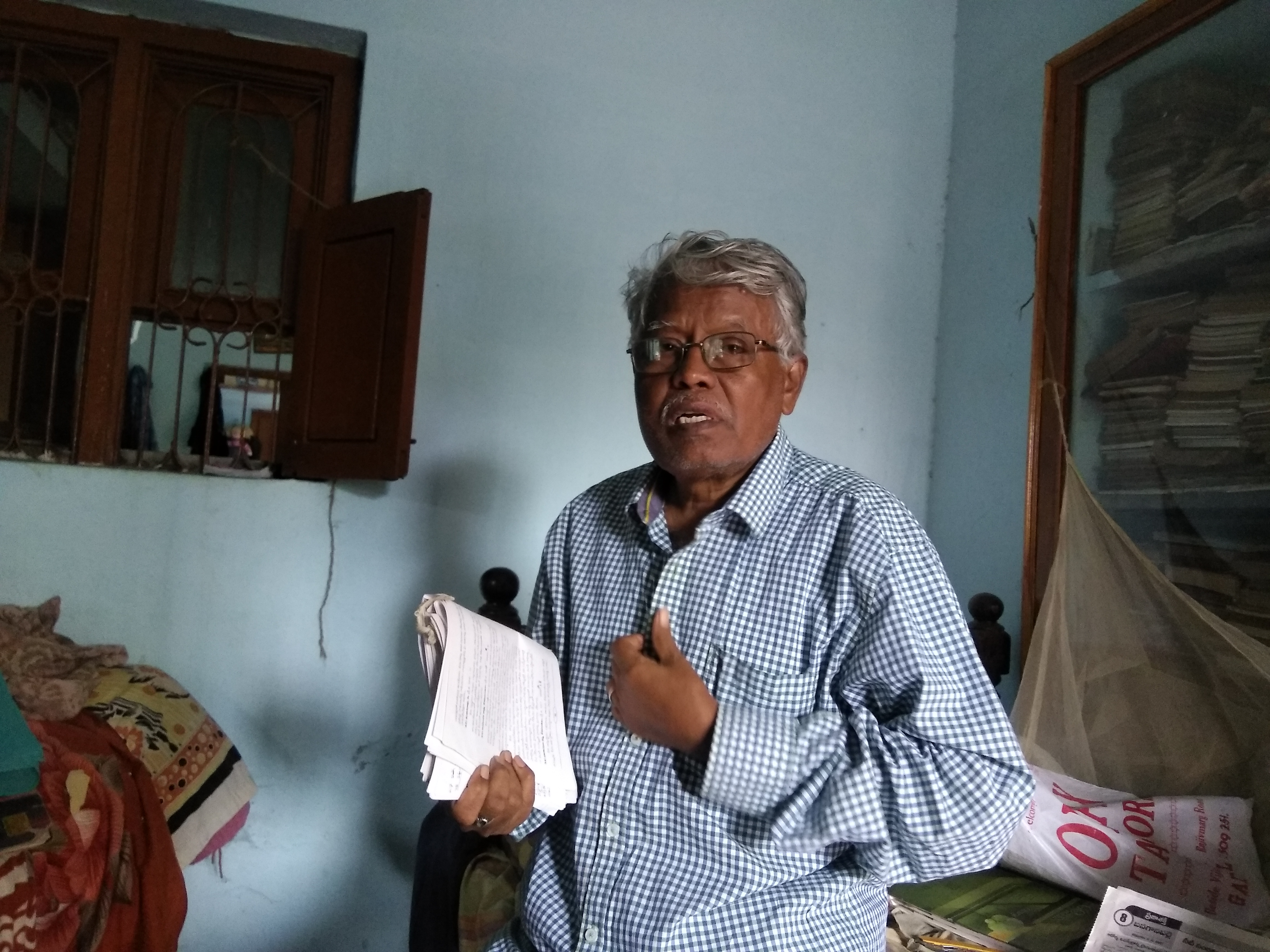 కవి, రచయిత